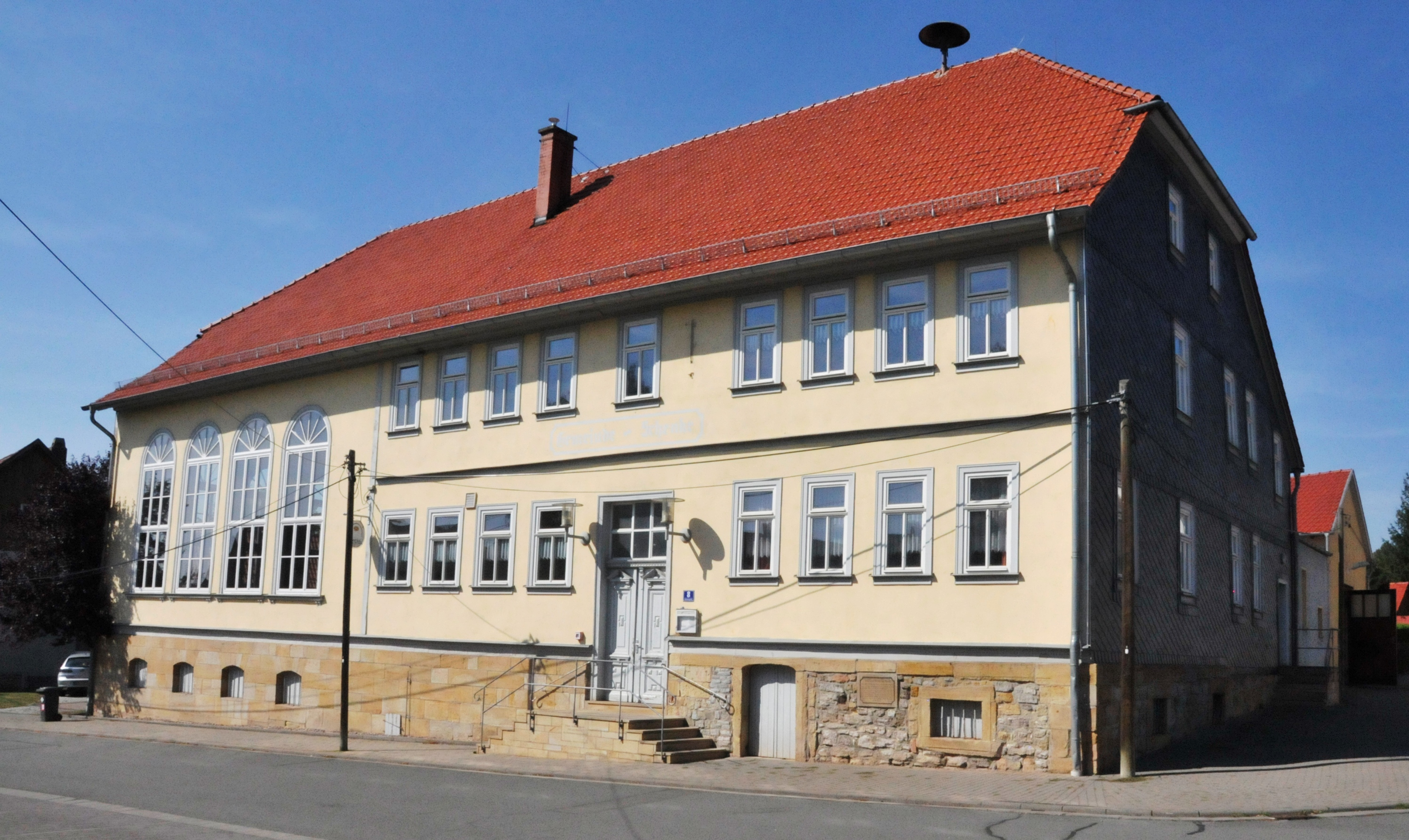 Molschleben, Gemeindeschenke